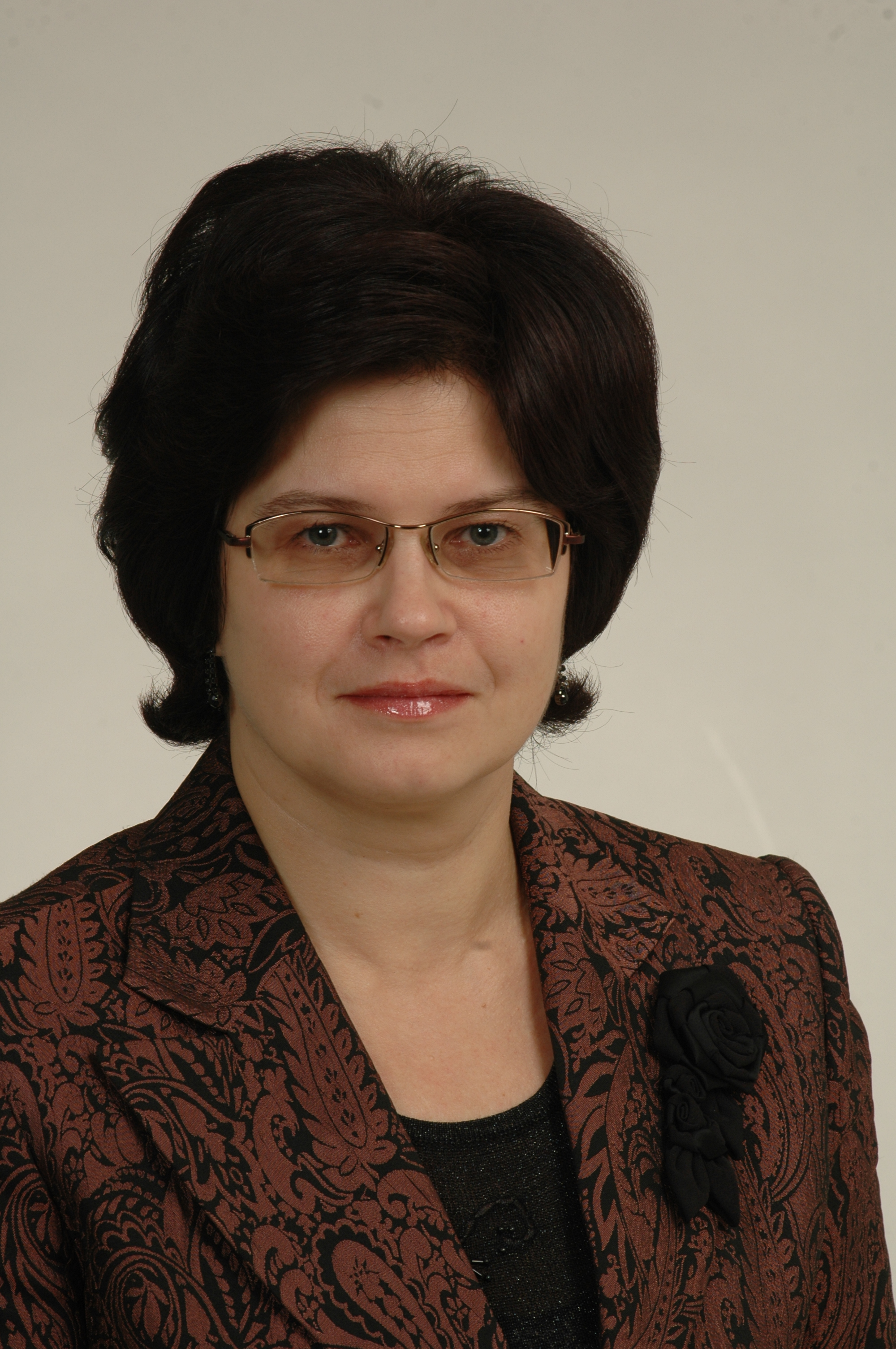 Foto: Saeima